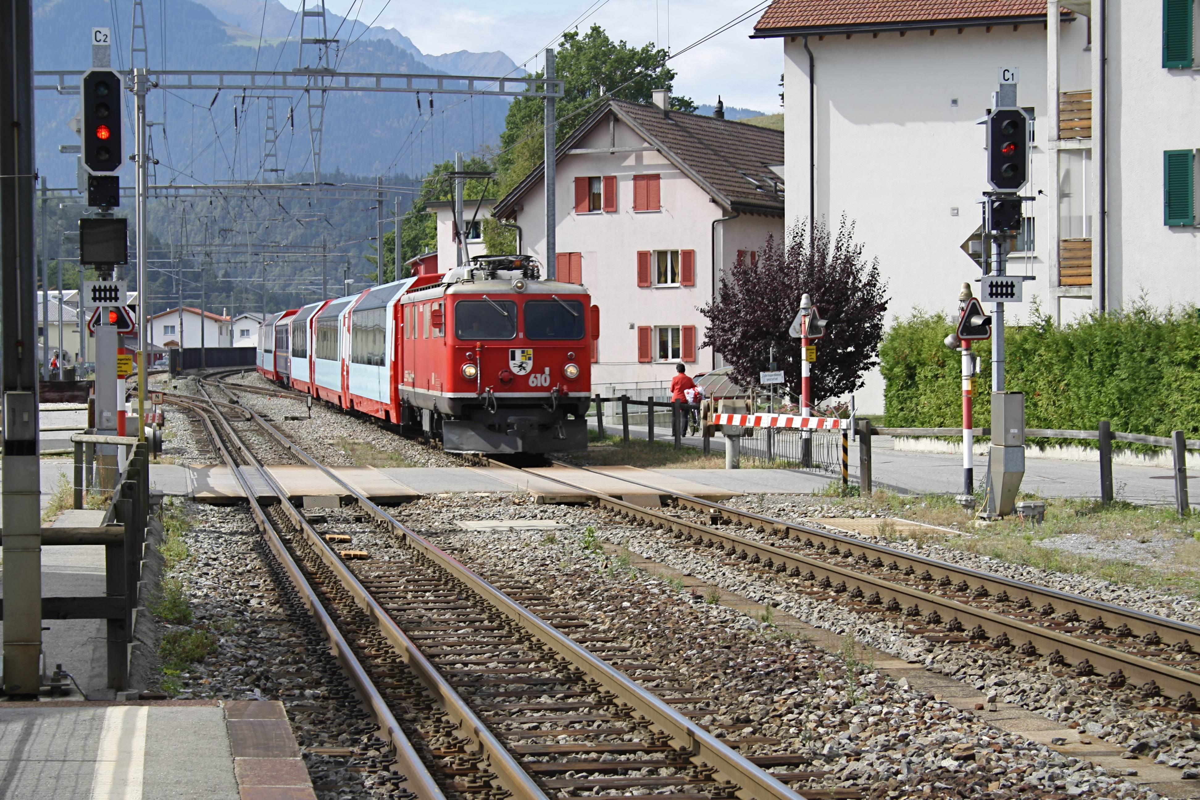 Glacier-Express in Domat-Ems